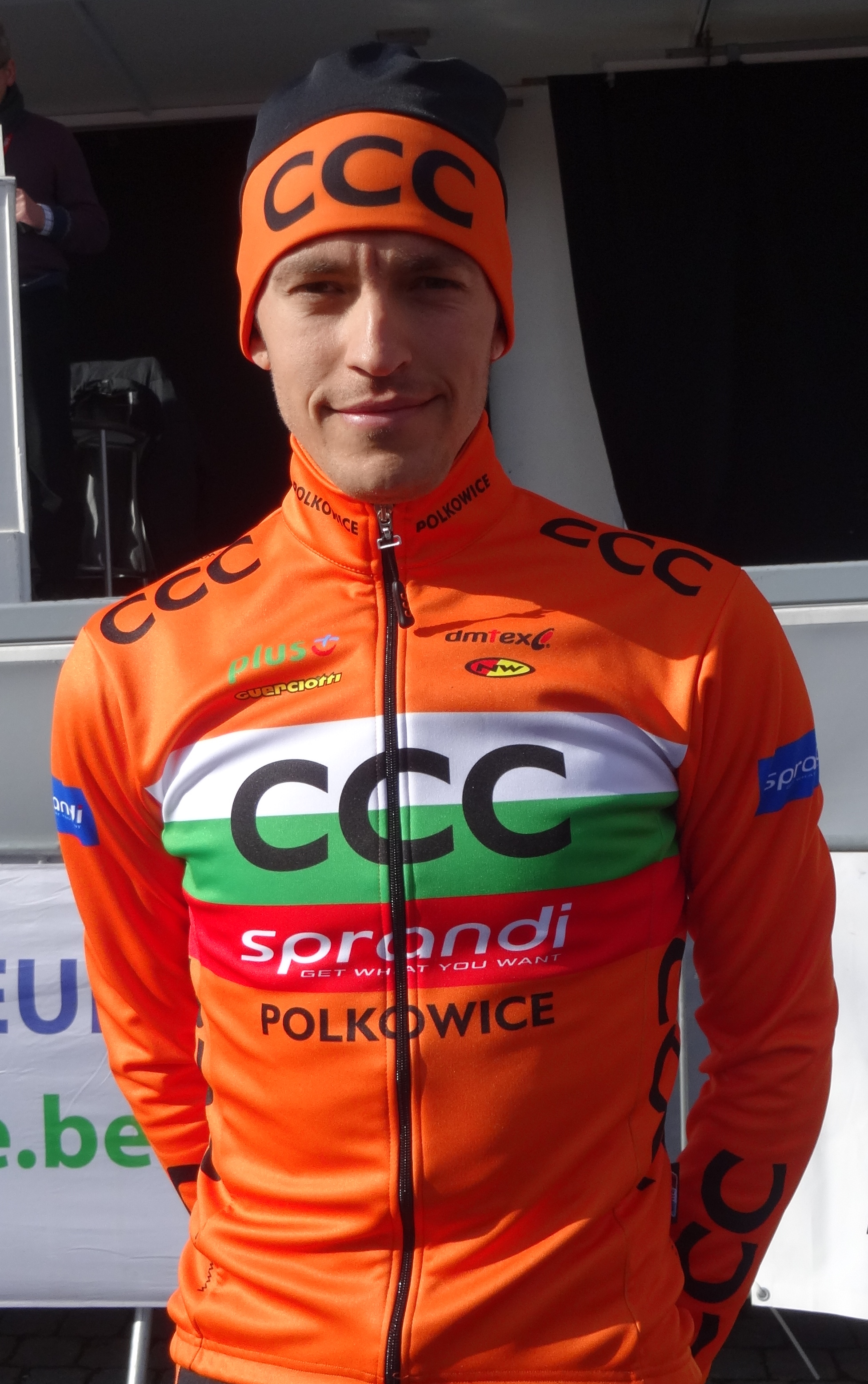 Reportage réalisé le mercredi 4 mars à l'occasion du départ du Samyn des Dames 2015 et du Samyn 2015 à Quaregnon, Belgique.